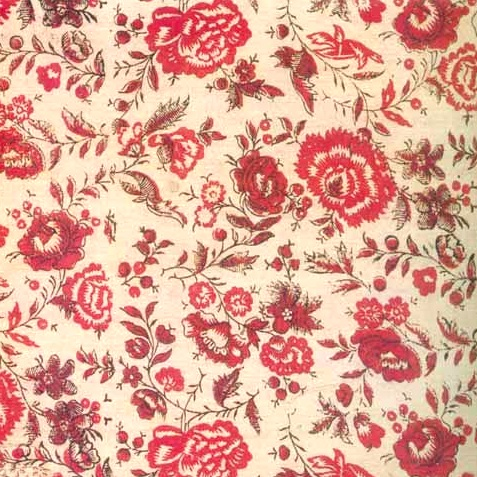 Ситец мануфактуры Е. И. Грачёва (Иваново), кон. XVIII — нач. XIX вв.